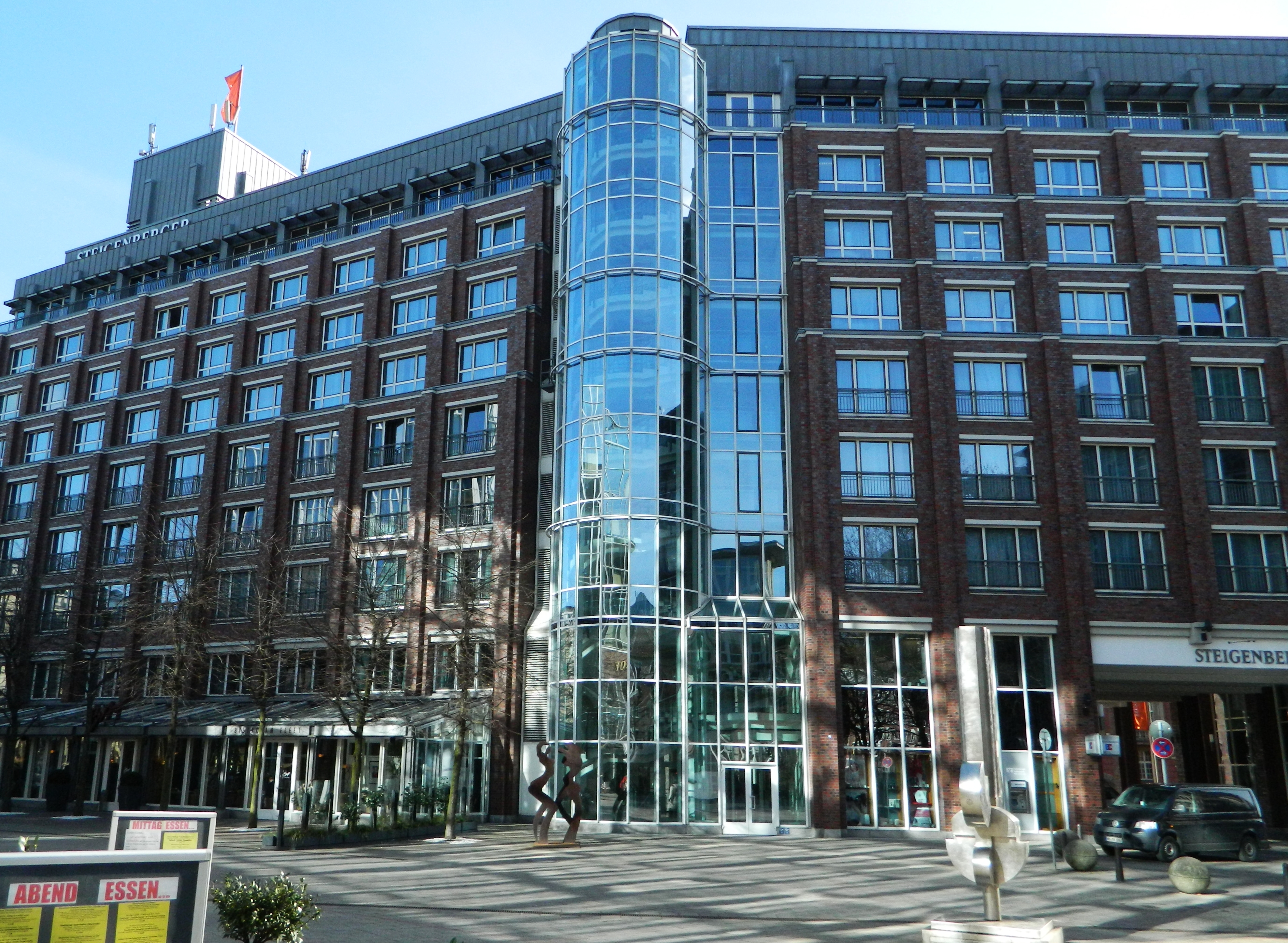 Steigenberger